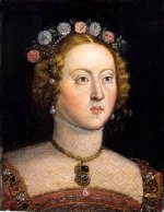 Retrato de la infanta portuguesa María Manuela de Portugal (1527-1545), que fue hija del rey Juan III de Portugal y de la reina Catalina de Austria y princesa consorte de Asturias por su matrimonio con el prícipe Felipe de Austria, que era hijo del emperador Carlos I y llegaría a reinar en España tras la muerte de María Manuela como Felipe II de España.